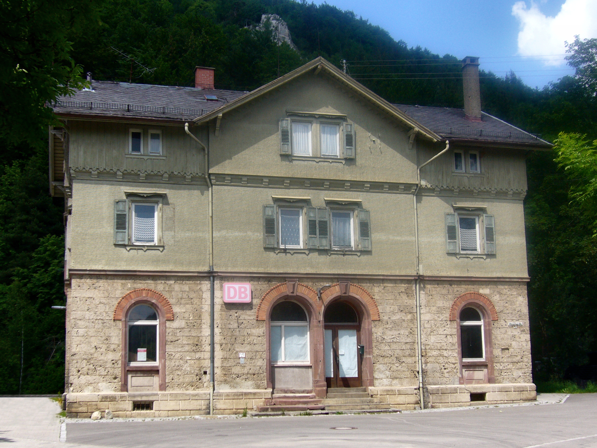 Bahnhof Fridingen an der Donau an der Donautalbahn (Baden-Württemberg)